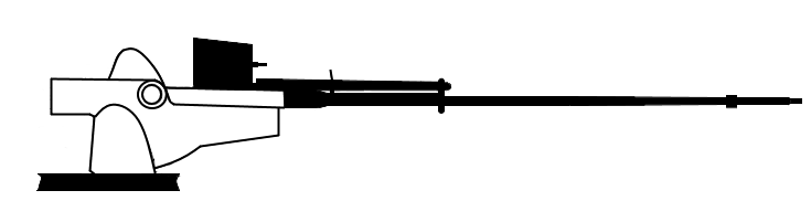 En enkel linje ritning av en rörlig lavett för HS.404 på flygplan.